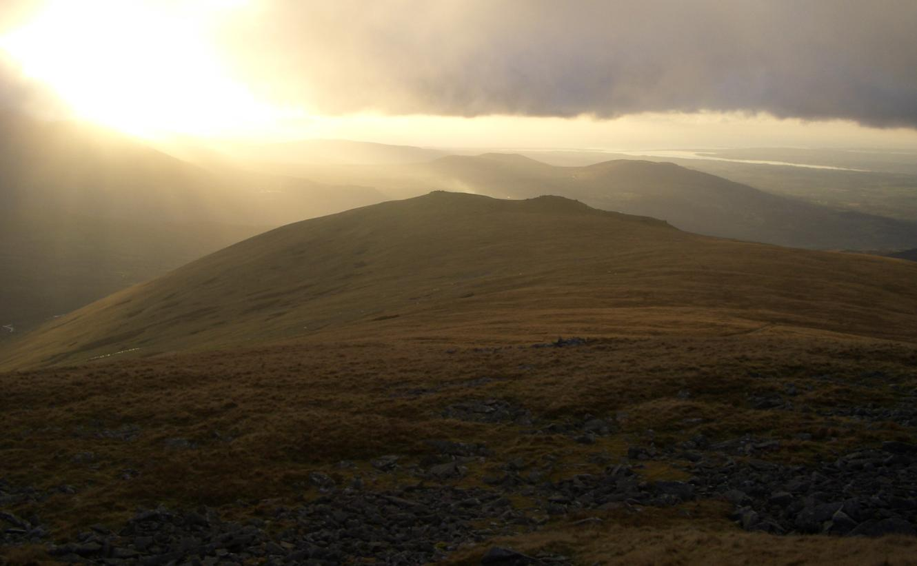 Gyrn Wigau from Drosgl